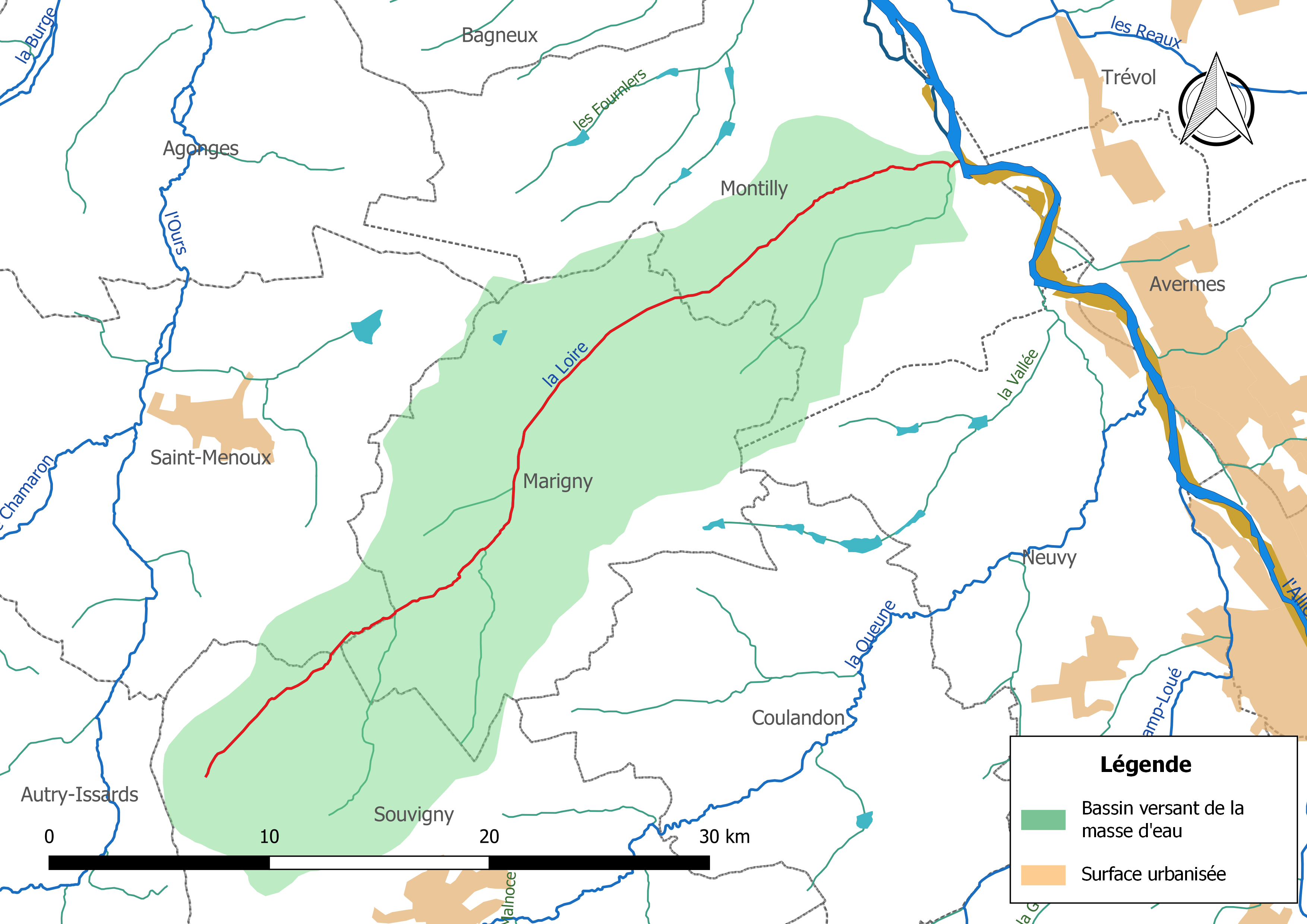 Carte de la masse d'eau « FRGR1903 », avec mise en exergue du cours d'eau « la Loire », affluent de l'Allier (en rouge).